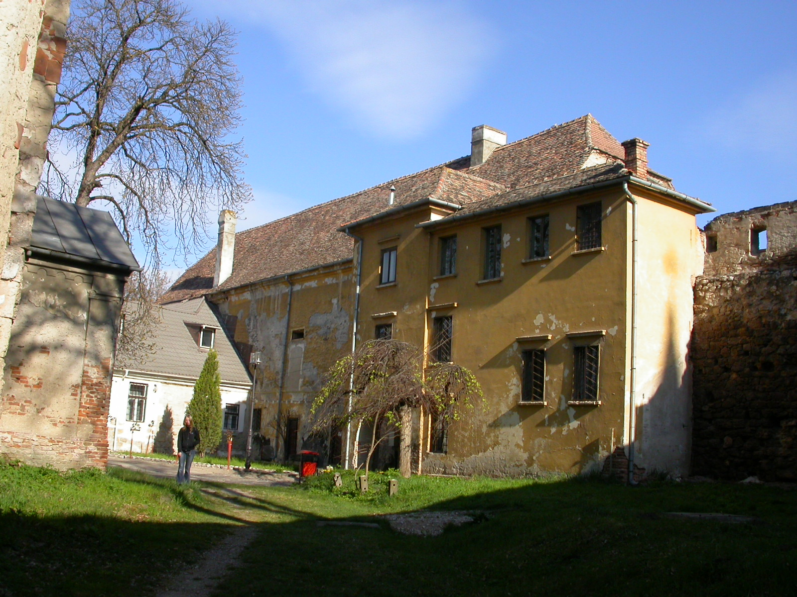 Castelul Bethlen Aiud, sec. XV - XVI, modif. sec. XVII - XVIII 01